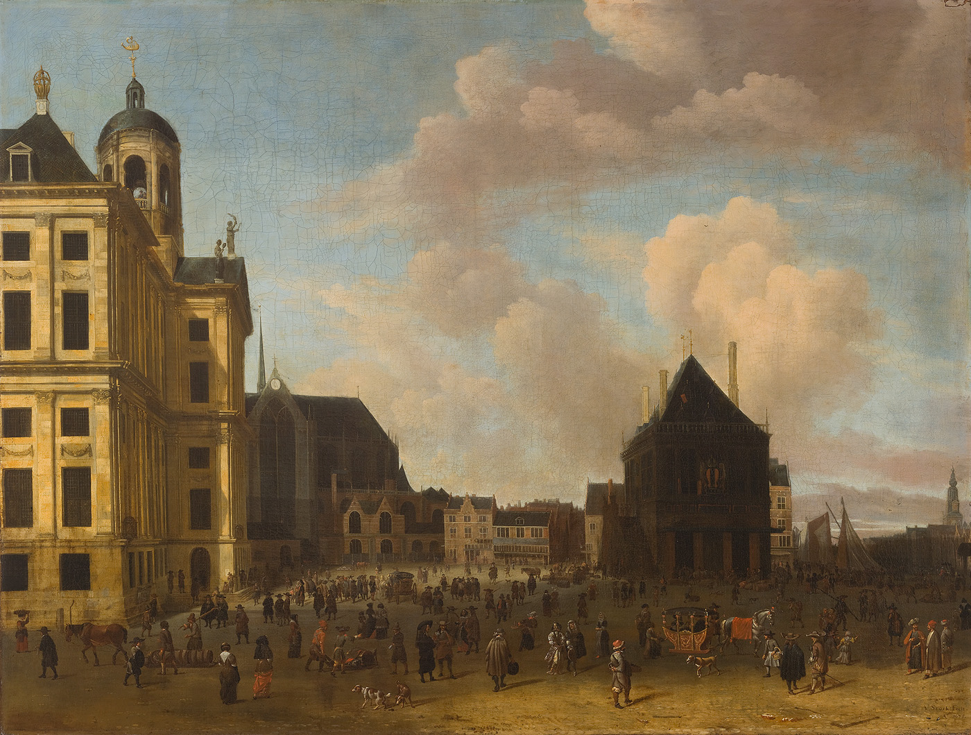 schilderij; stadsgezicht; stadsgezicht Amsterdam; Dam; Waag; Stadhuis; Nieuwe Kerk